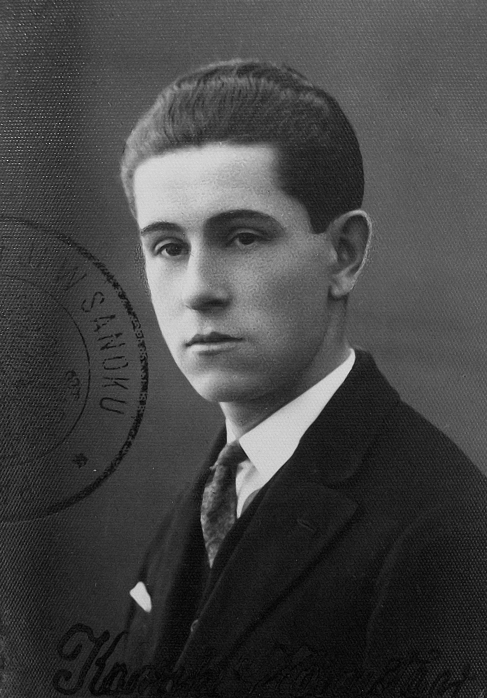 Stanisław-Kostka Marian Hubert Kawski (fotografia portretowa na świadectwie dojrzałości z 1931).